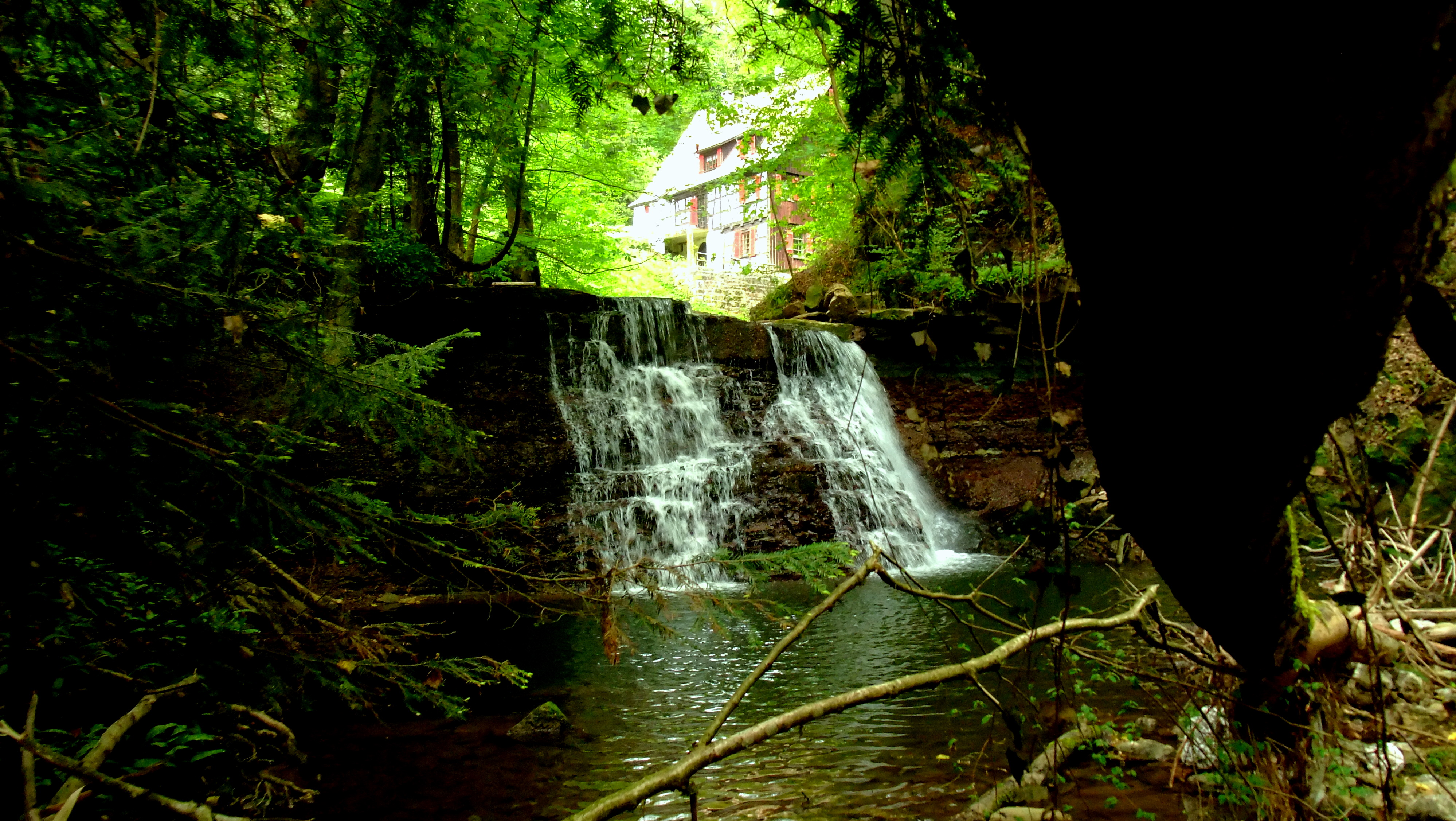 Wasserfall der Wieslauf, im Hintergrund die Klingenmühle